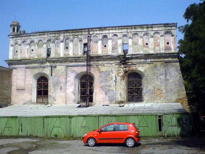 Синагога, м. Жовква.